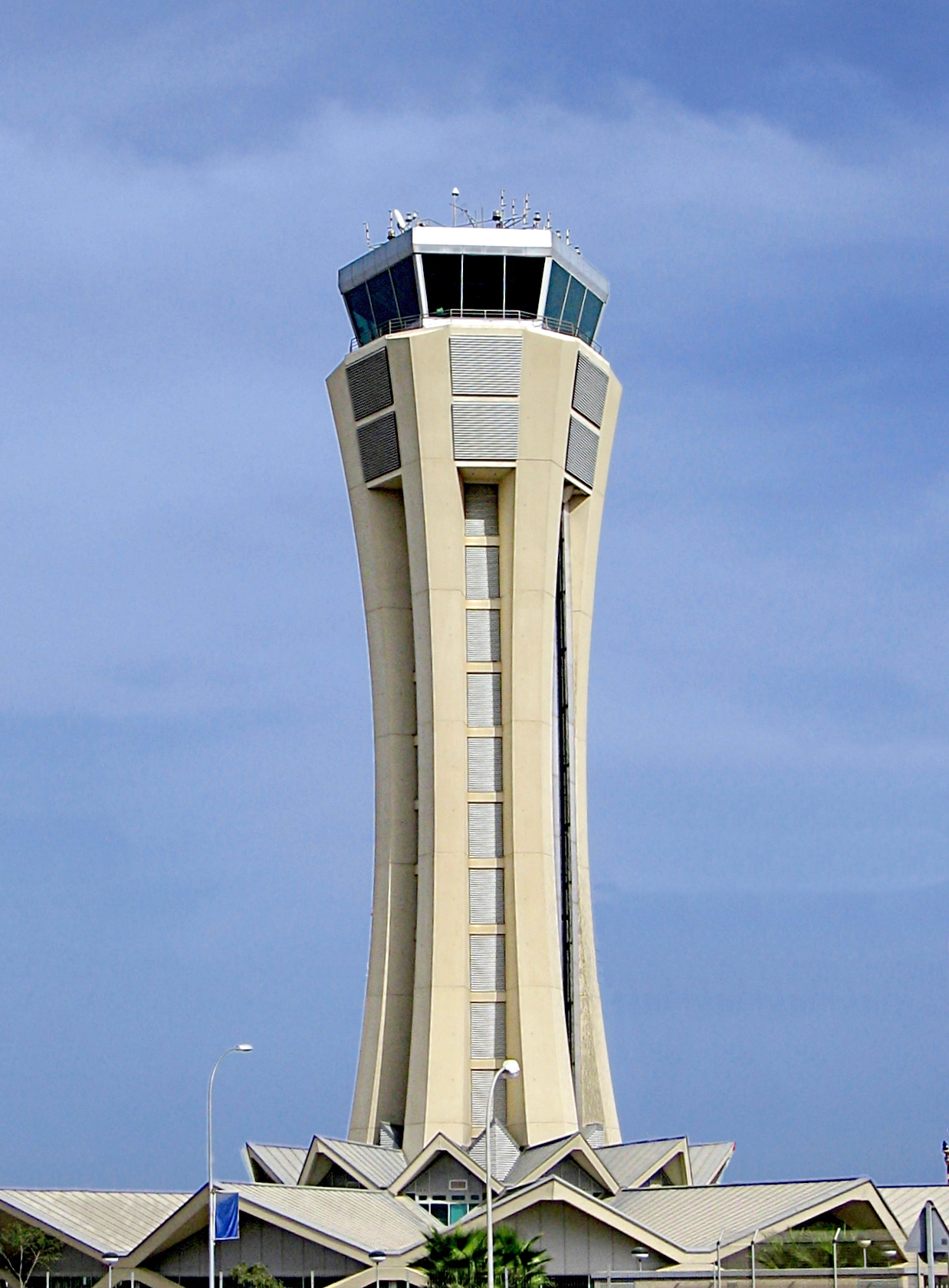 Torre de control del aeropuerto de Málaga, España